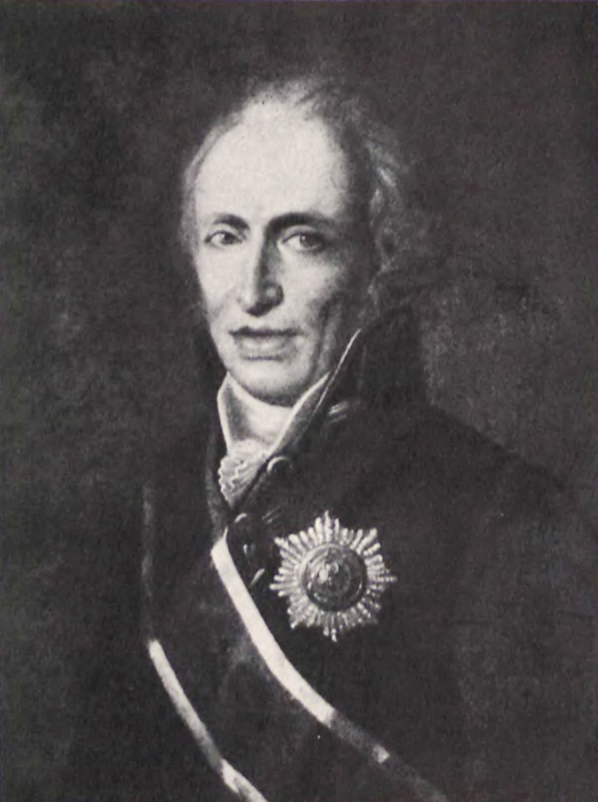 Walerian Dzieduszycki - portret nieznanego malarza